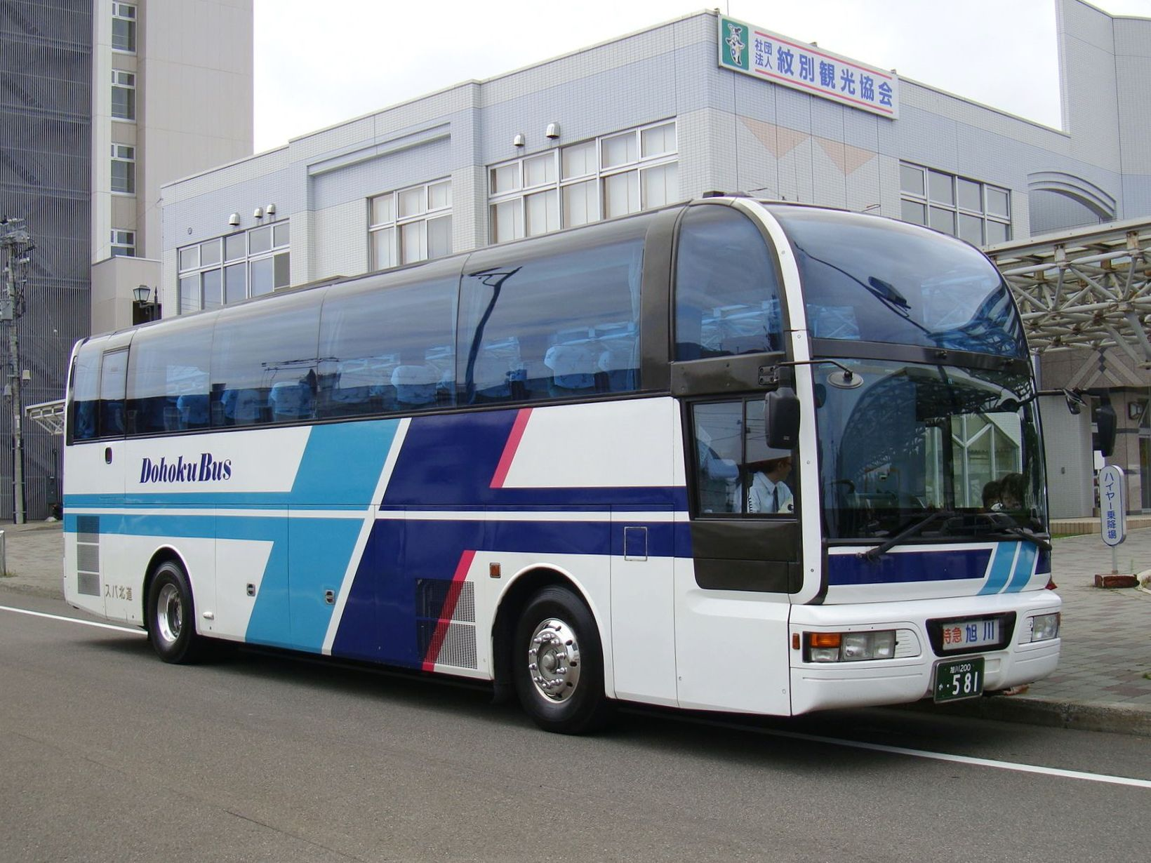 "Tokkyū Okhotsk gō" Monbetsu to Asahikawa